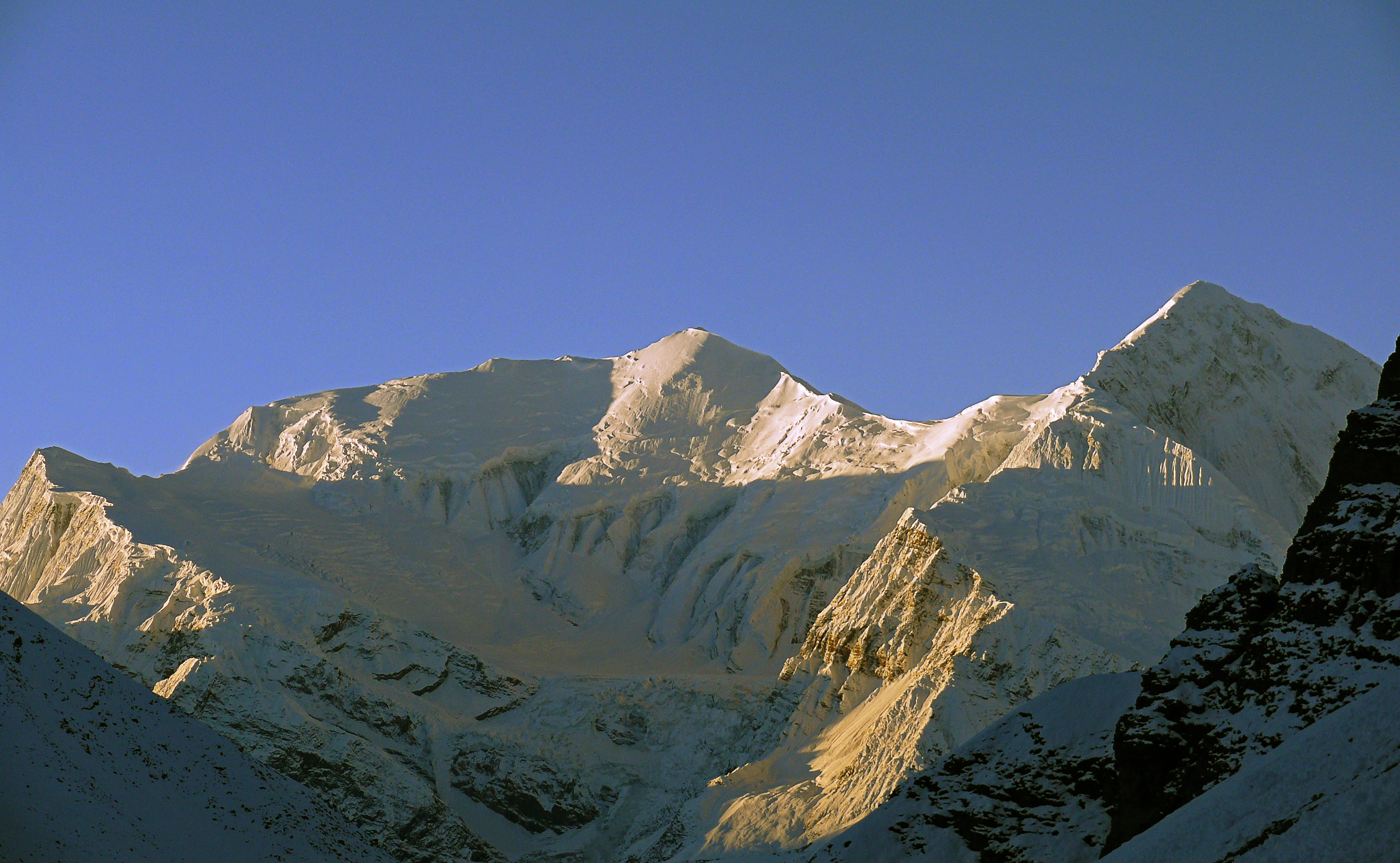 Annapurna III und Gangapurna von Thorang Phedi aus gesehen.